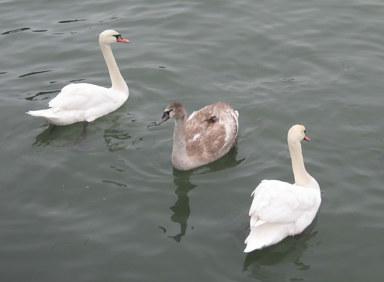 каждую зиму лебеди прилетают в Керчь